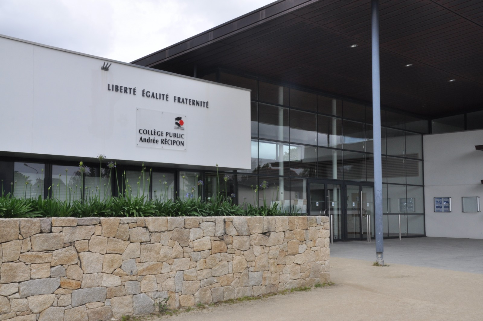 Collège Andrée Recipon Orgères